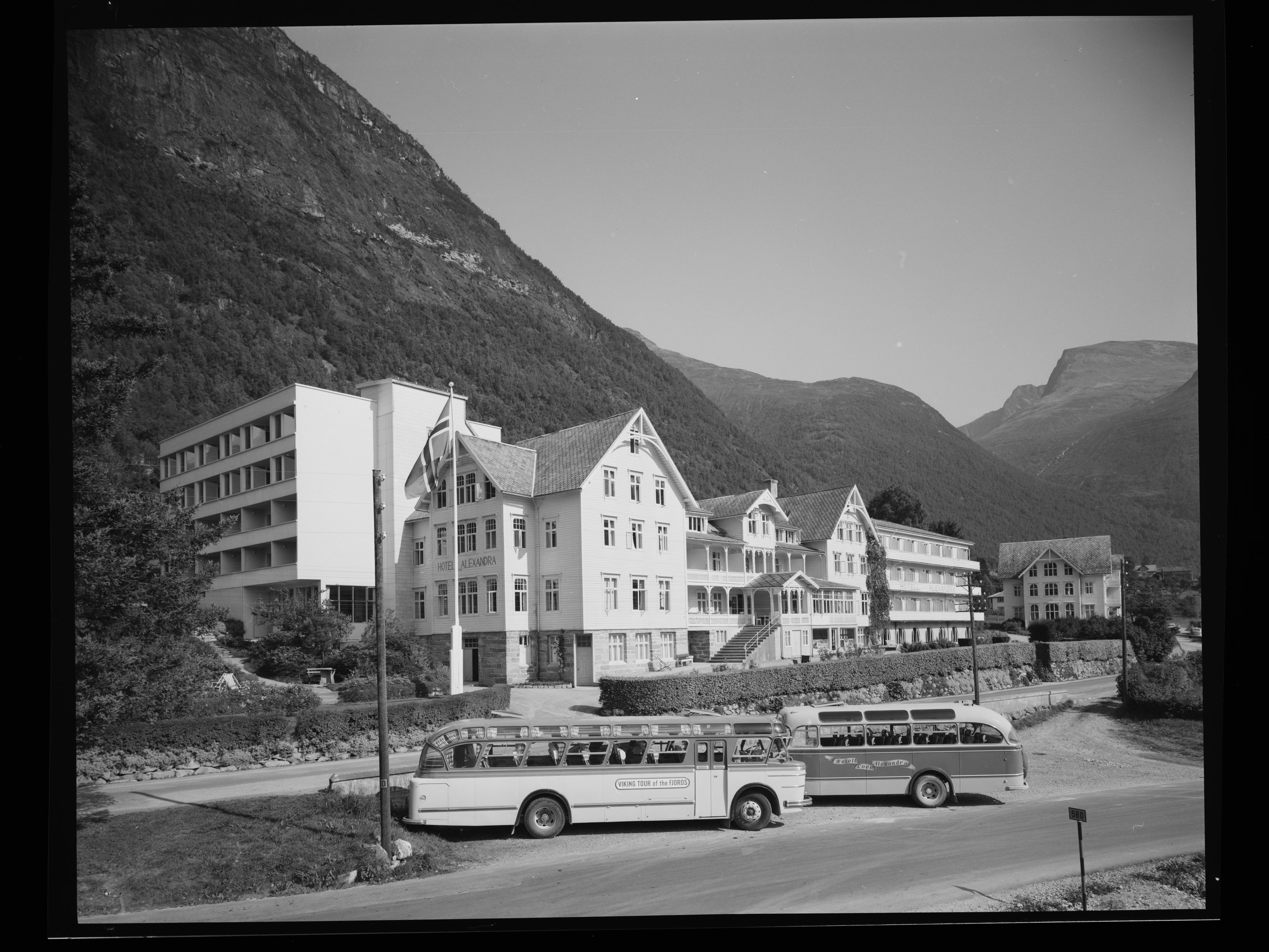 Bildet er hentet fra Nasjonalbibliotekets bildesamling. Anmerkninger til bildet var: Fotograf: ÅM Loen, Stryn, Sogn og Fjordane